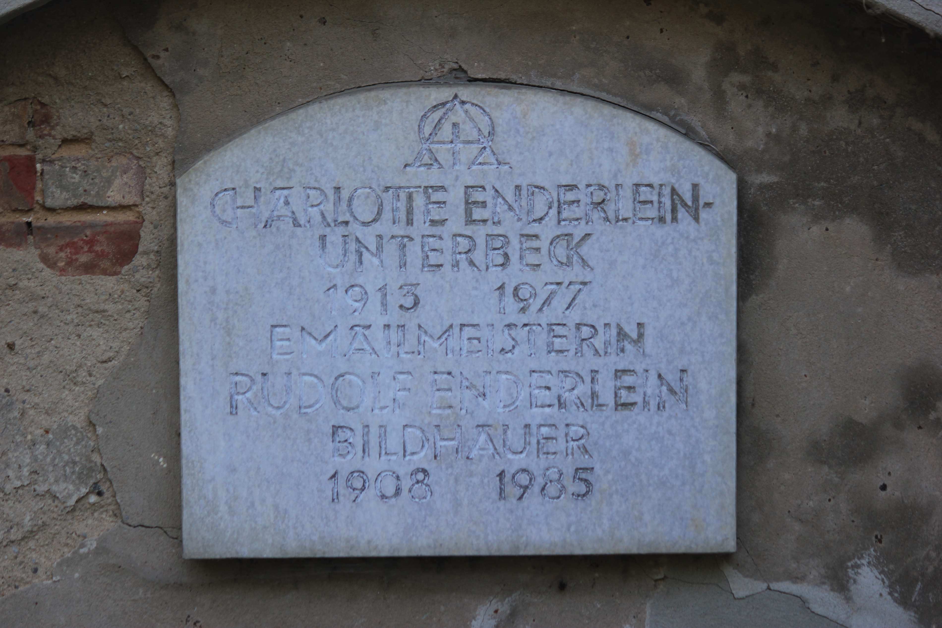 Hornjoserbsce: Kěrchow na Hrodźišku w Budyšinje; wopomnjenska plata za Rudolfa Enderleina.